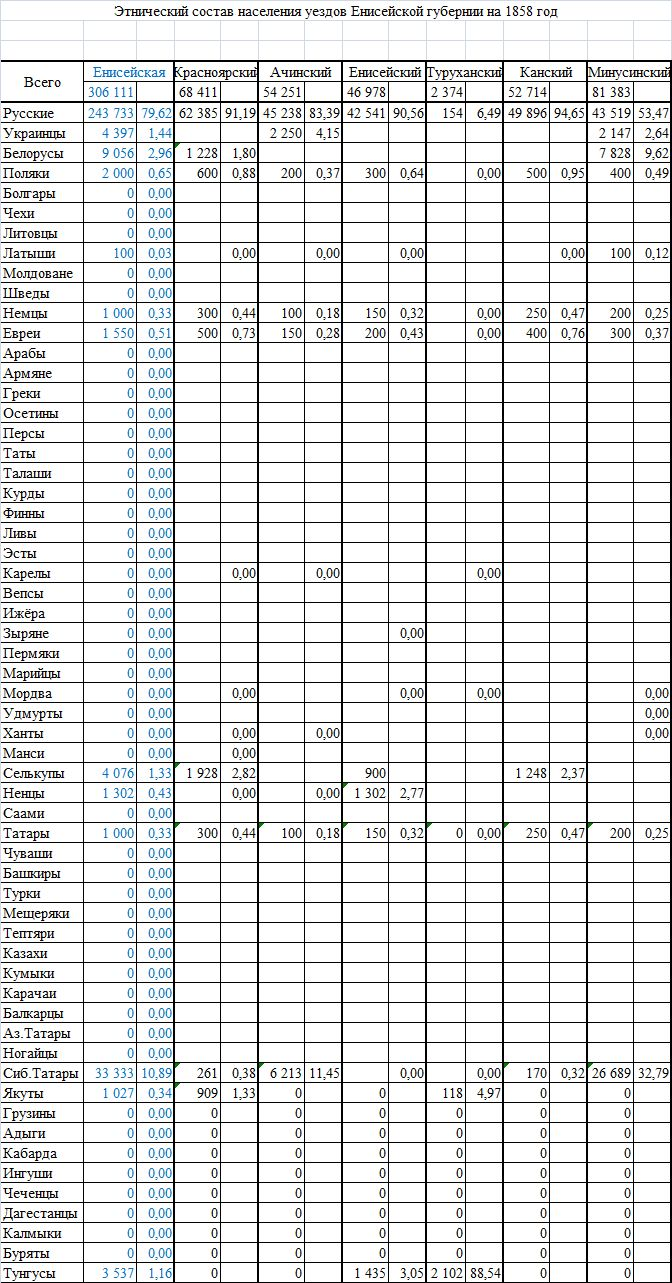 Список населённых мест Енисейской губернии